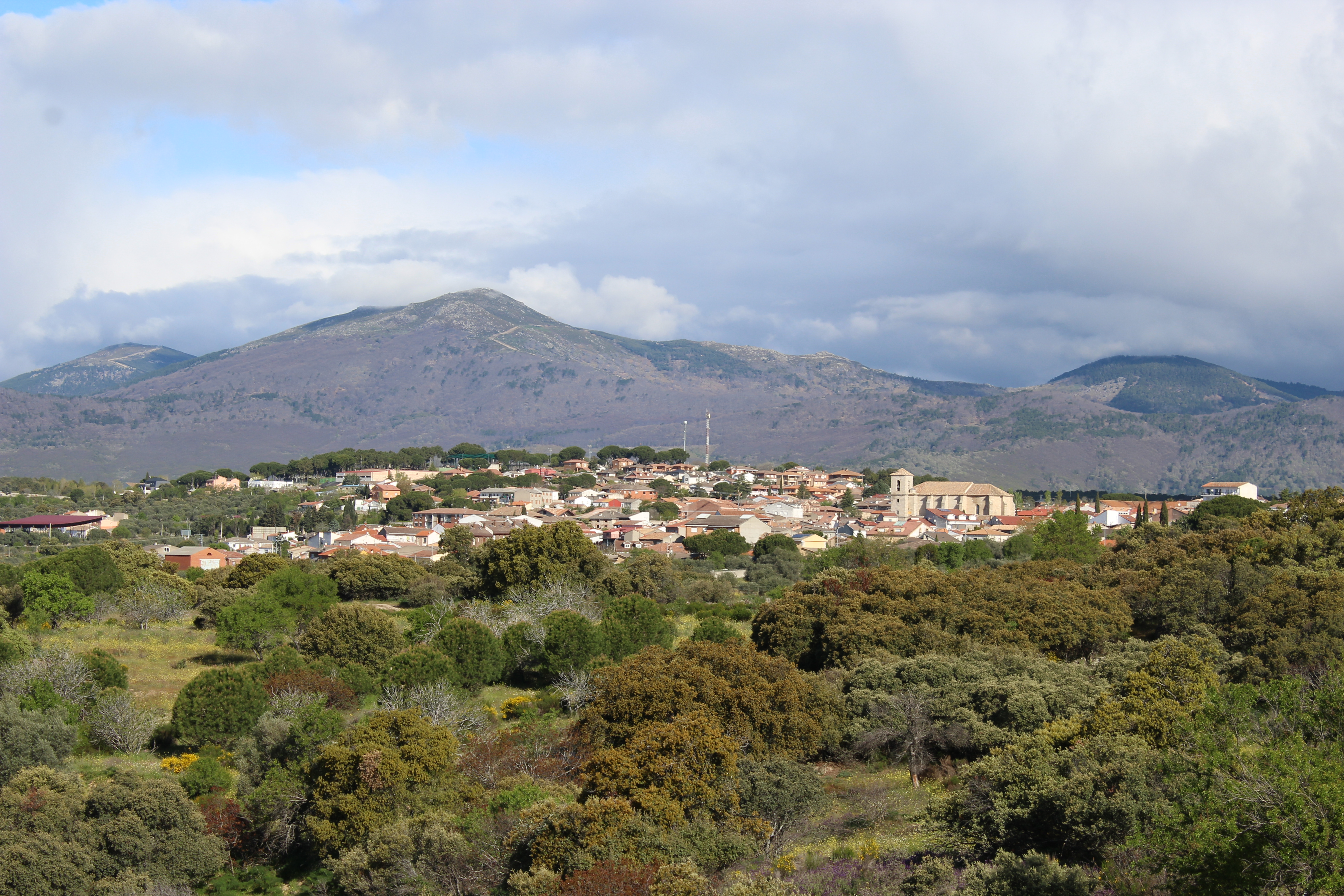 Cadalso de los Vidrios, Comunidad de Madrid.